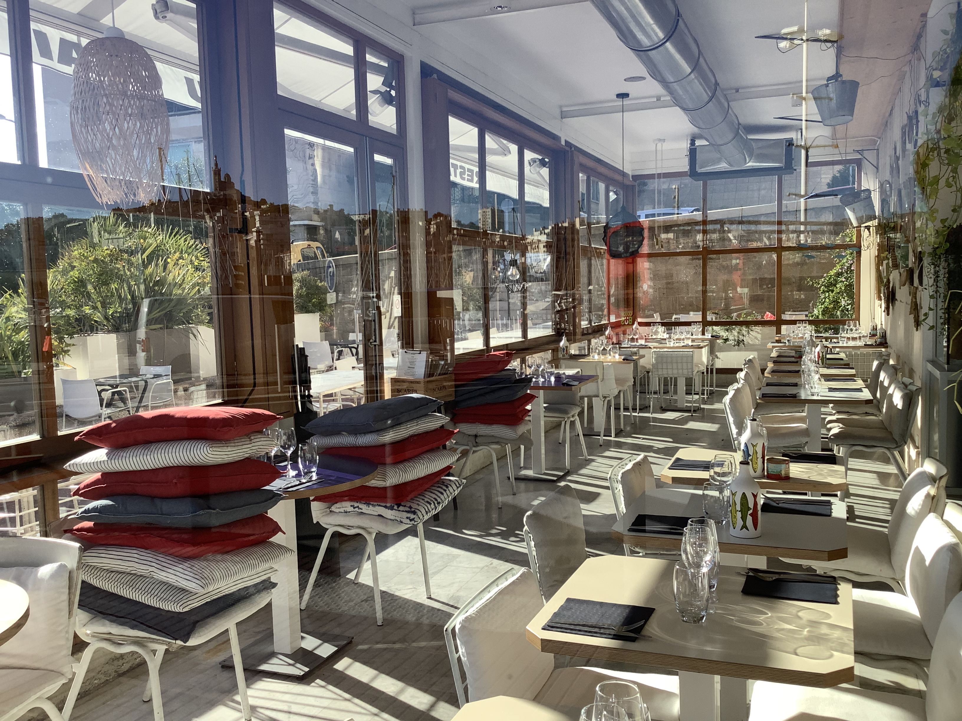 Marseille restaurant "Au bout du quai"